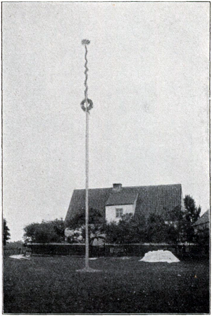 Ungmansstång på Storgården på Kyrkbinge , Gothem i juli 1905.. Fotografi av O. V. Wennersten. lllustration i Bröllopsseder på Gotland artikel i Fataburen 1906. av Nils Lithberg